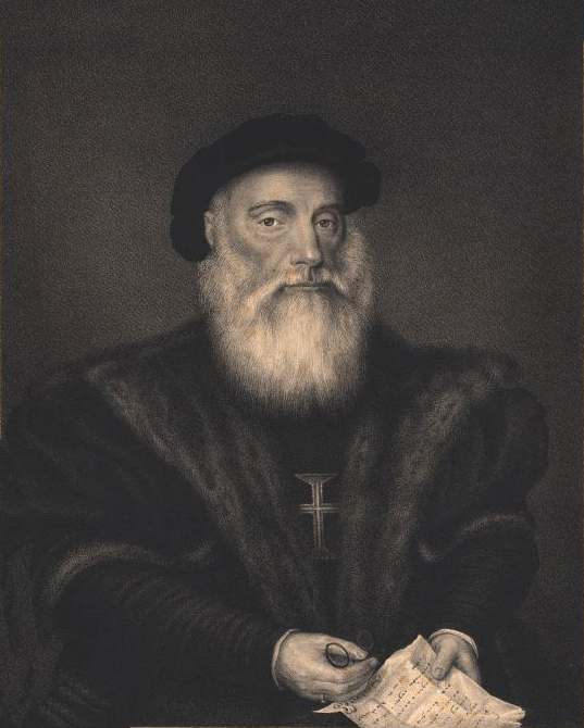 Vasco da Gama, navegador e explorador português.